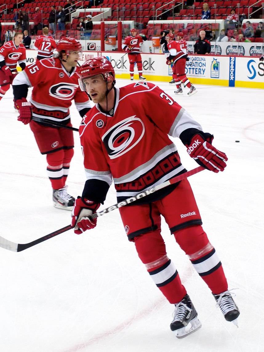 Tim Brent